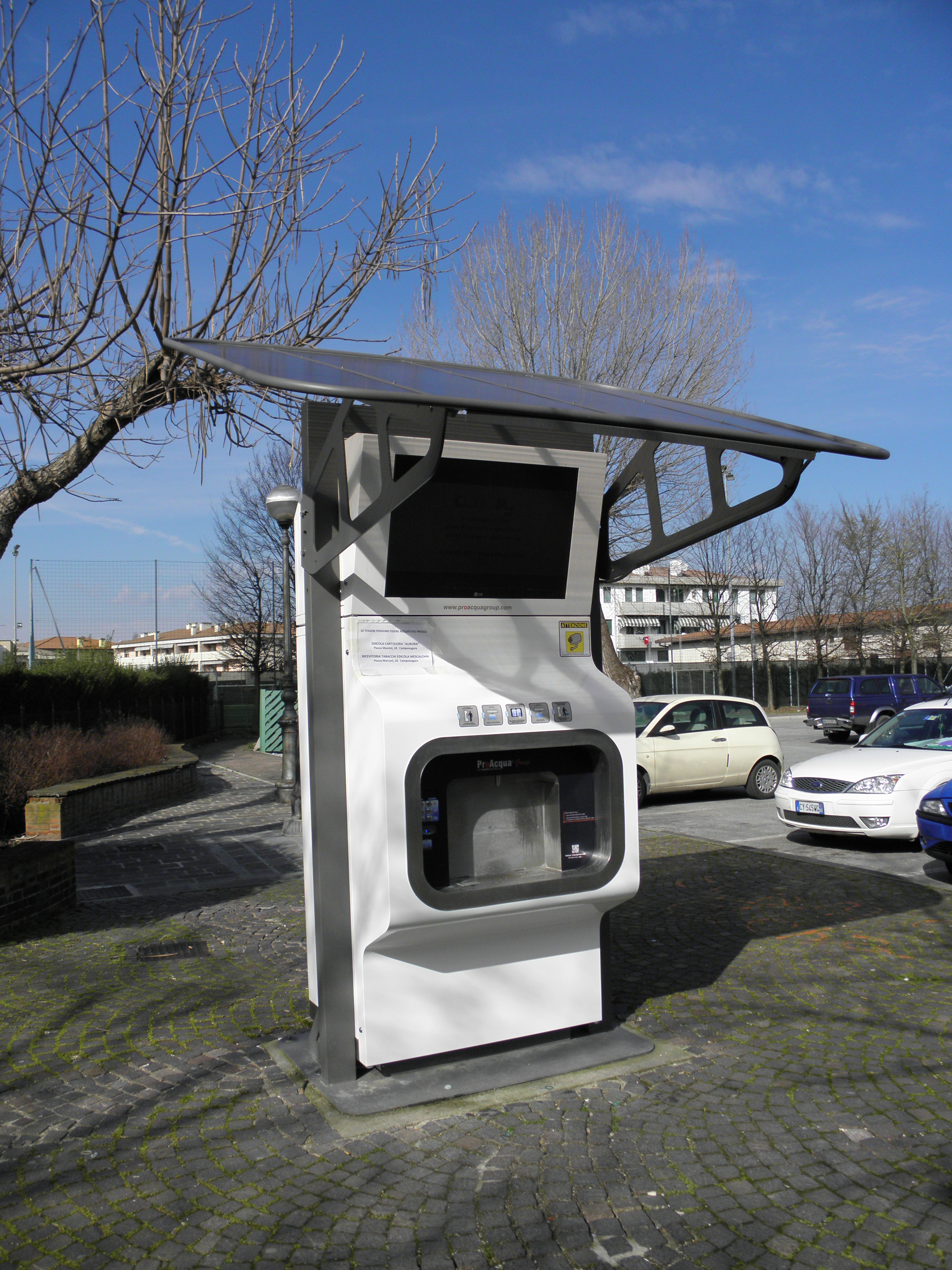 Camponogara: la fontana pubblica tecnologica che eroga acqua minerale naturale e gasata